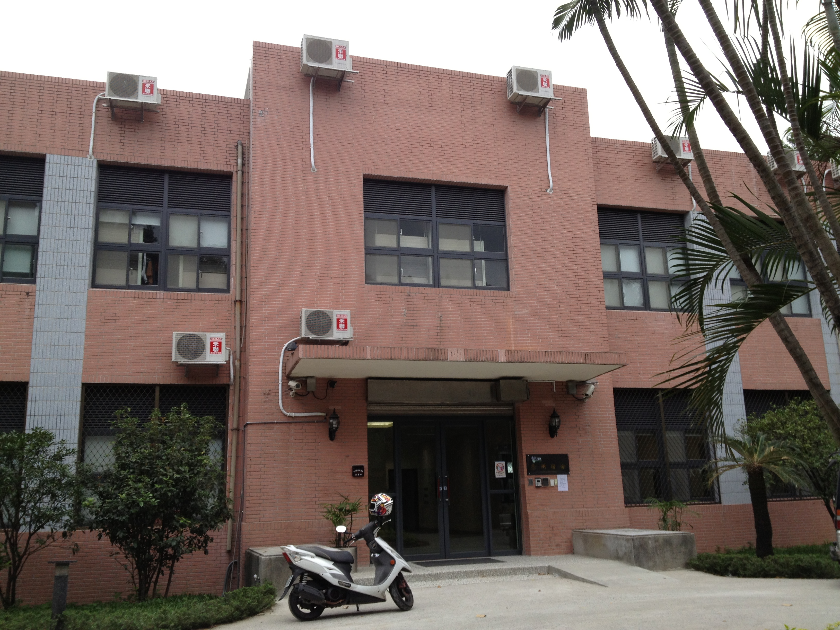 舊的公衛大樓，現今正改建為住院醫師宿舍